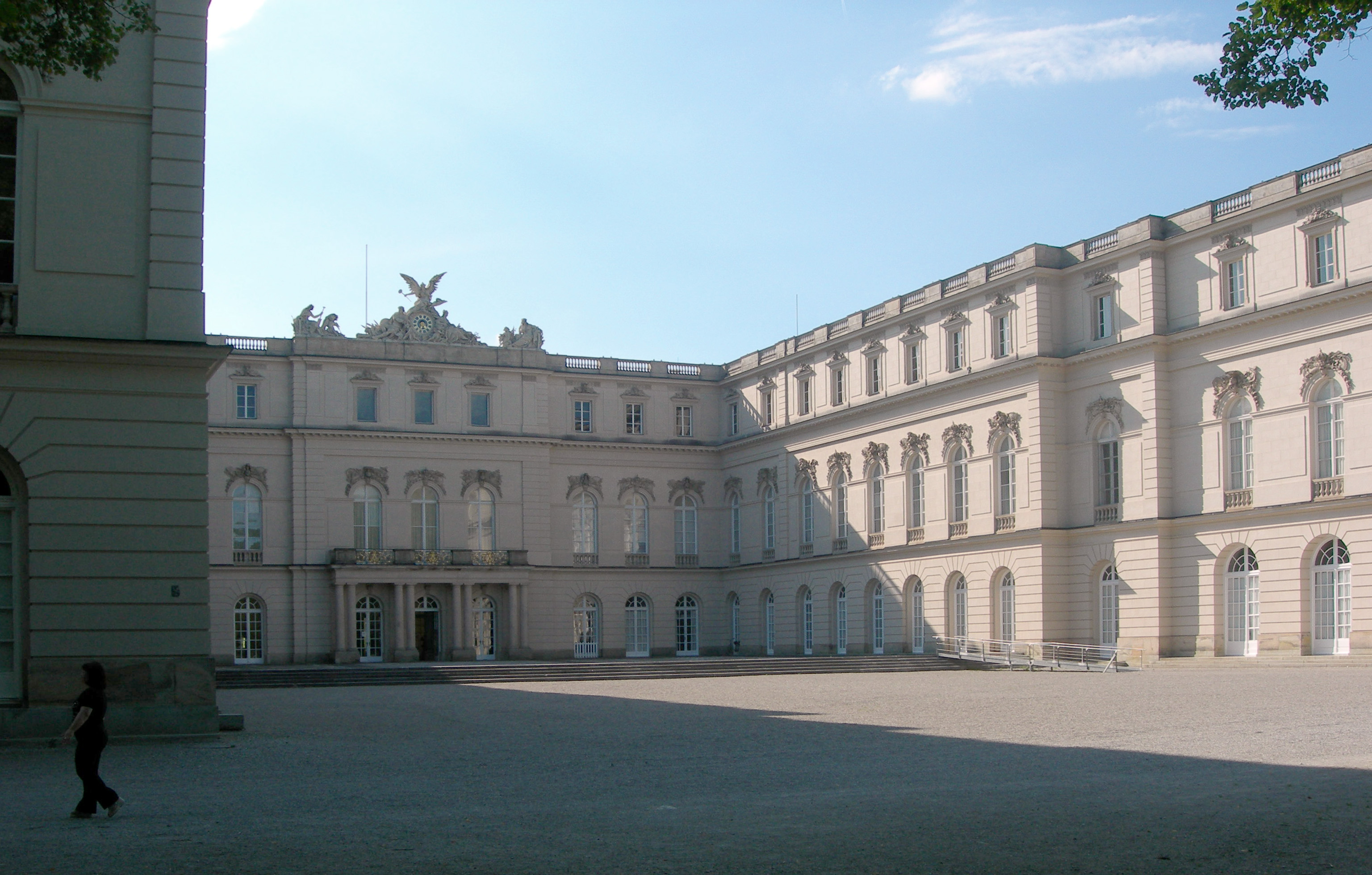 Schlos Herrenchiemsee, Hofseite. Eigene Aufnahme